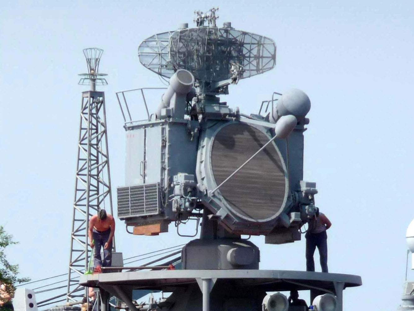 Антенный пост 3Р95 ЗРК «Кинжал» на БПК «Адмирал Виноградов», Владивосток, 16.07.2009.